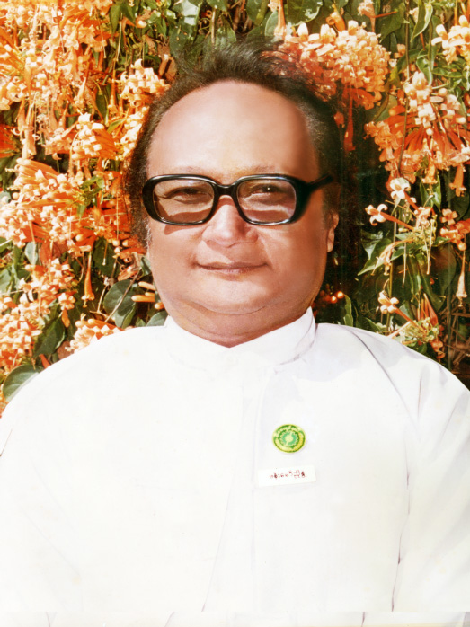 မြန်မာဘာသာ: သော်ကပန်း